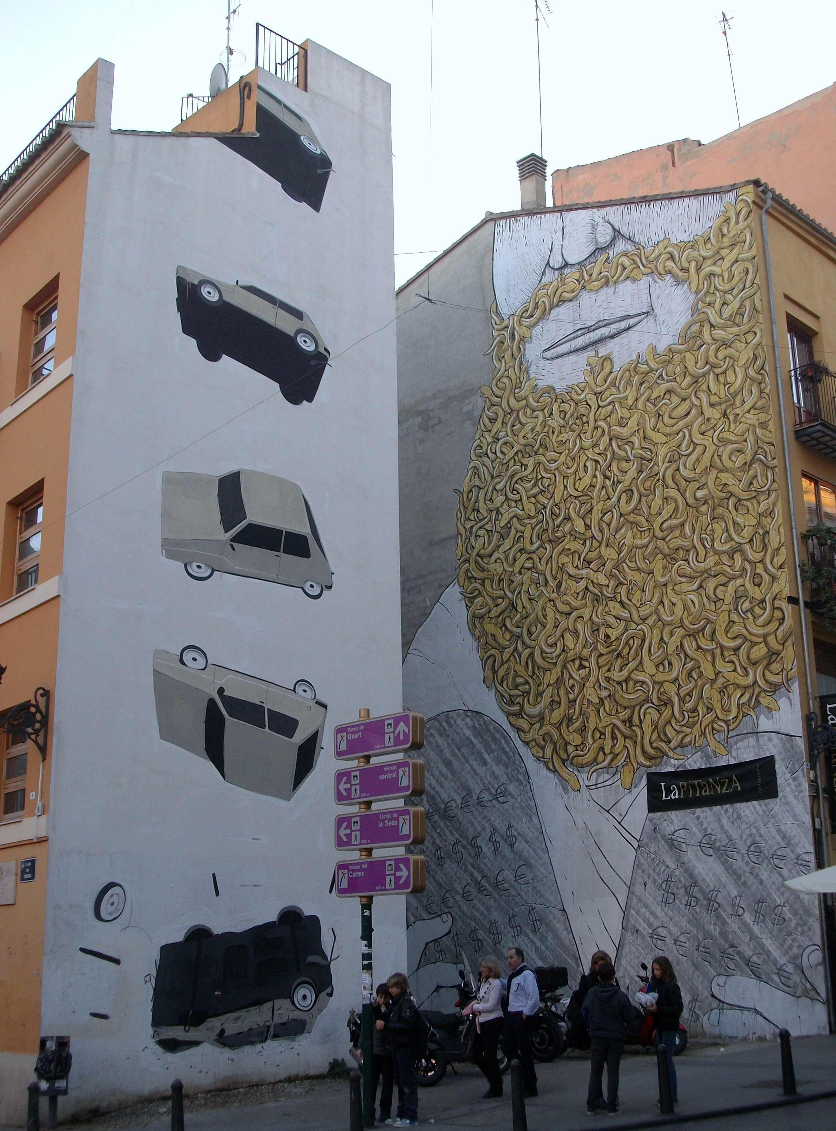 Murals a la plaça del Tossal de València.